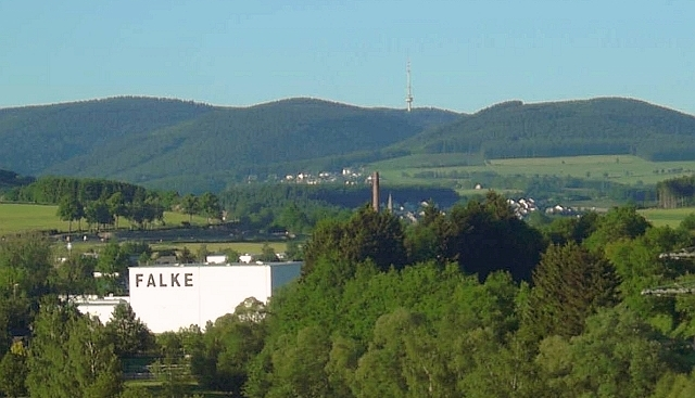 Hochregallager der Firma Falke in Schmallenberg. Im Hintergrund der Fernsehturm Hunau., Germany.